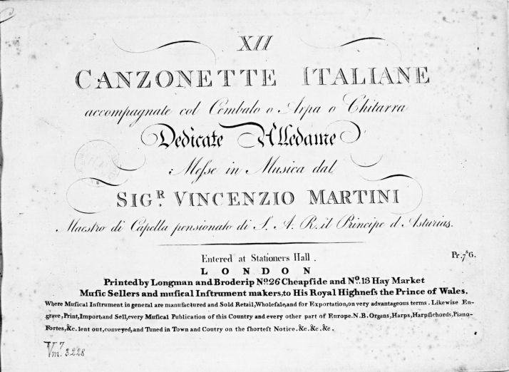 Vicente Martín y Soler (1754–1806): XII canzonette italiane accompagnate col cembalo o arpa o chitarra dedicate alle Dame (Erstausgabe Artaria, Wien 1787). Longman & Broderip, London 1788. Bibliothèque nationale de France. Titelblatt.